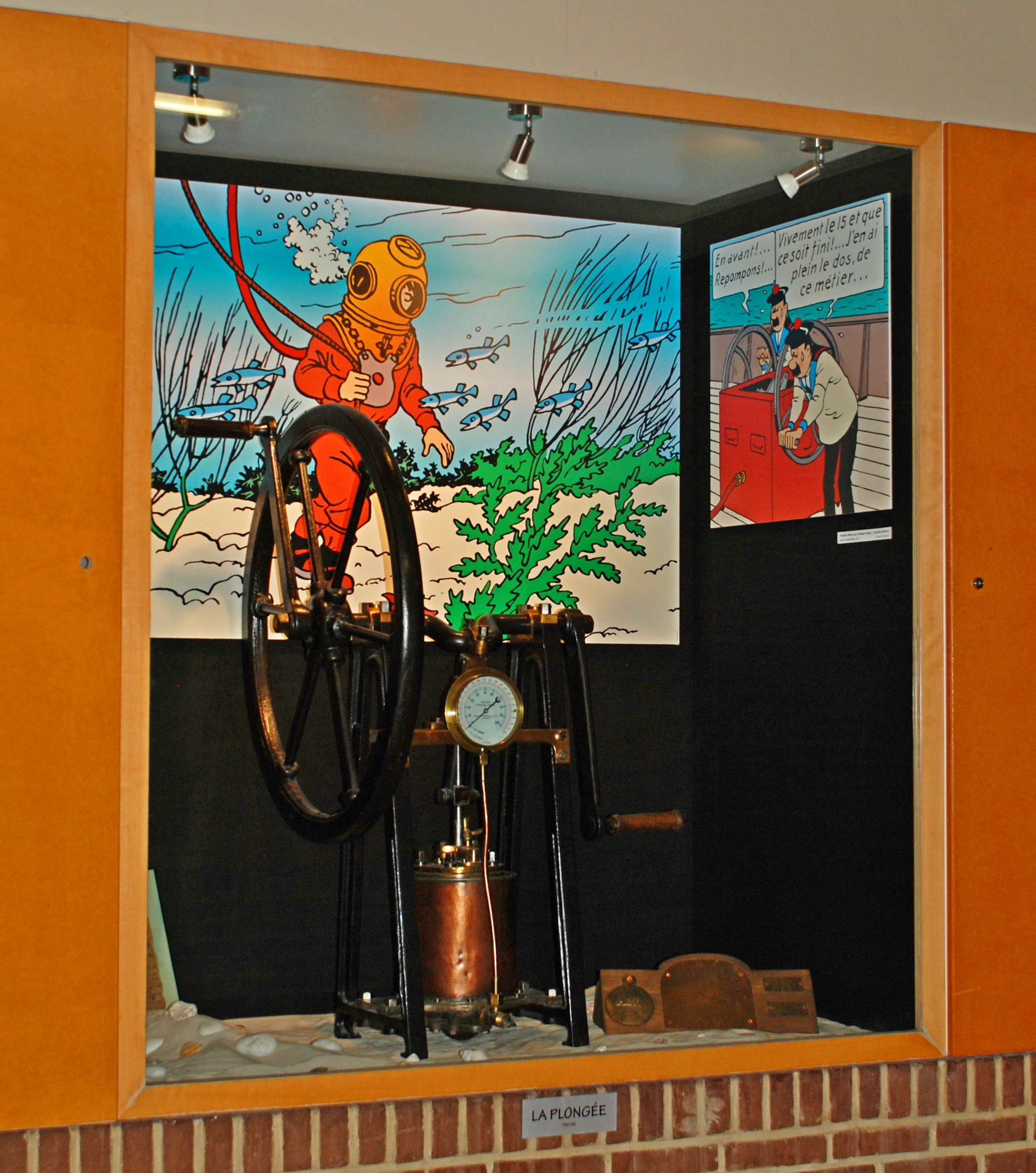 Belgique - Louvain-la-Neuve - Centre sportif de Blocry : Plongée / Tintin